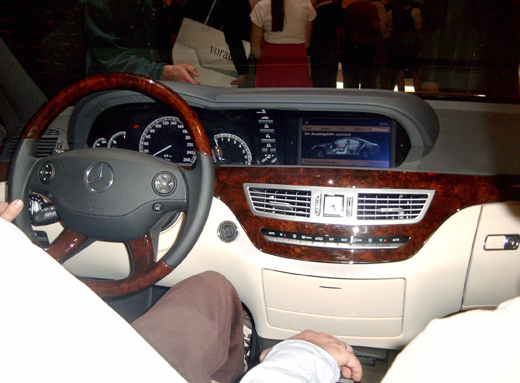 S-Klasse Innenraum auf der IAA 2005 in Frankfurt